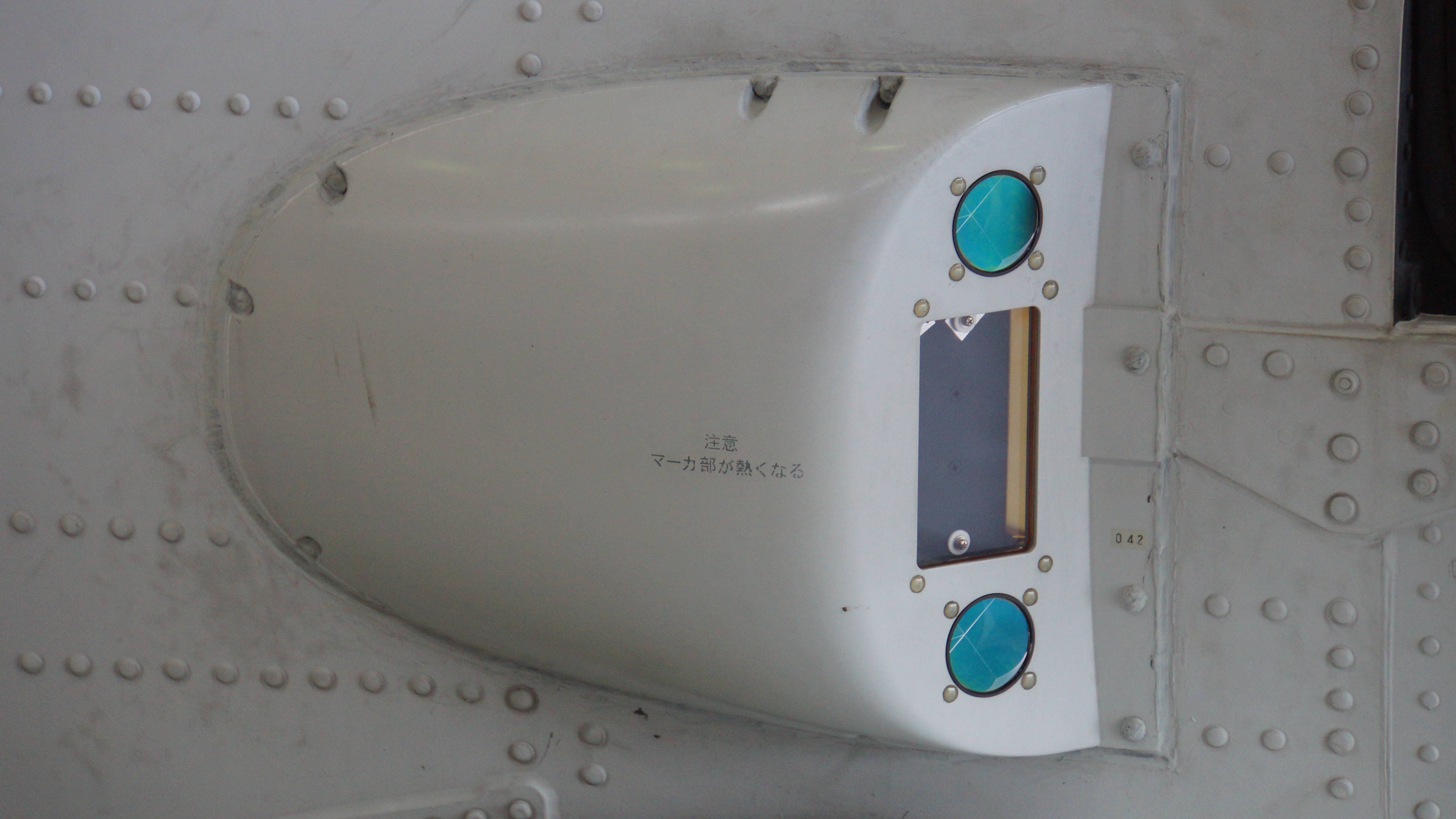 海上自衛隊 SH-60K哨戒ヘリコプター（8423号機） 右側着艦誘導支援装置（SLAS）センサー。2016年7月16日 舞鶴航空基地にて。